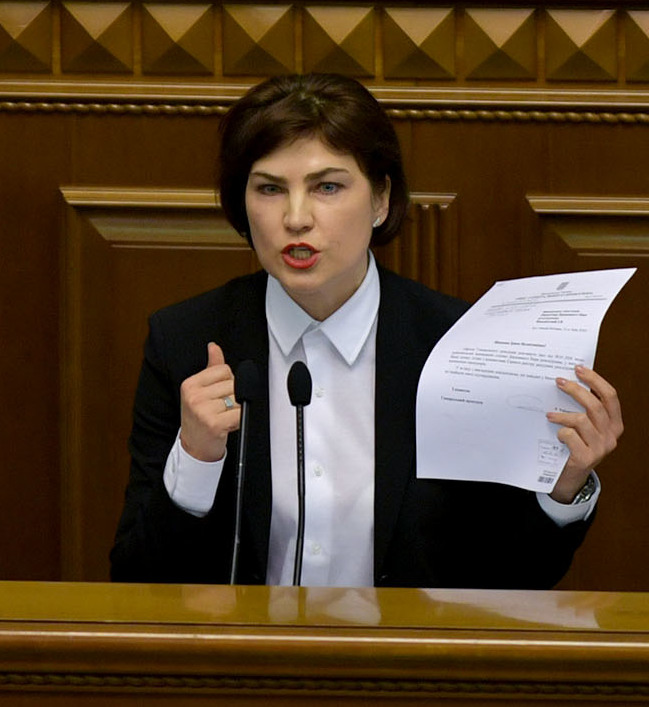 Ірина Венедіктова в Раді